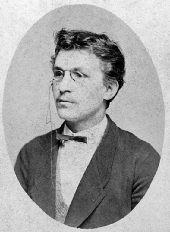 Leóš Janáček (1874)